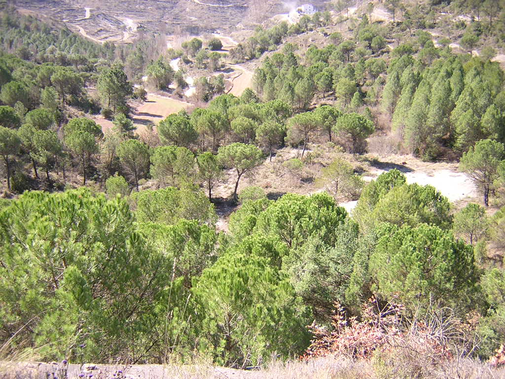 El Racó del Rovell (Monistrol de Calders, Moianès)